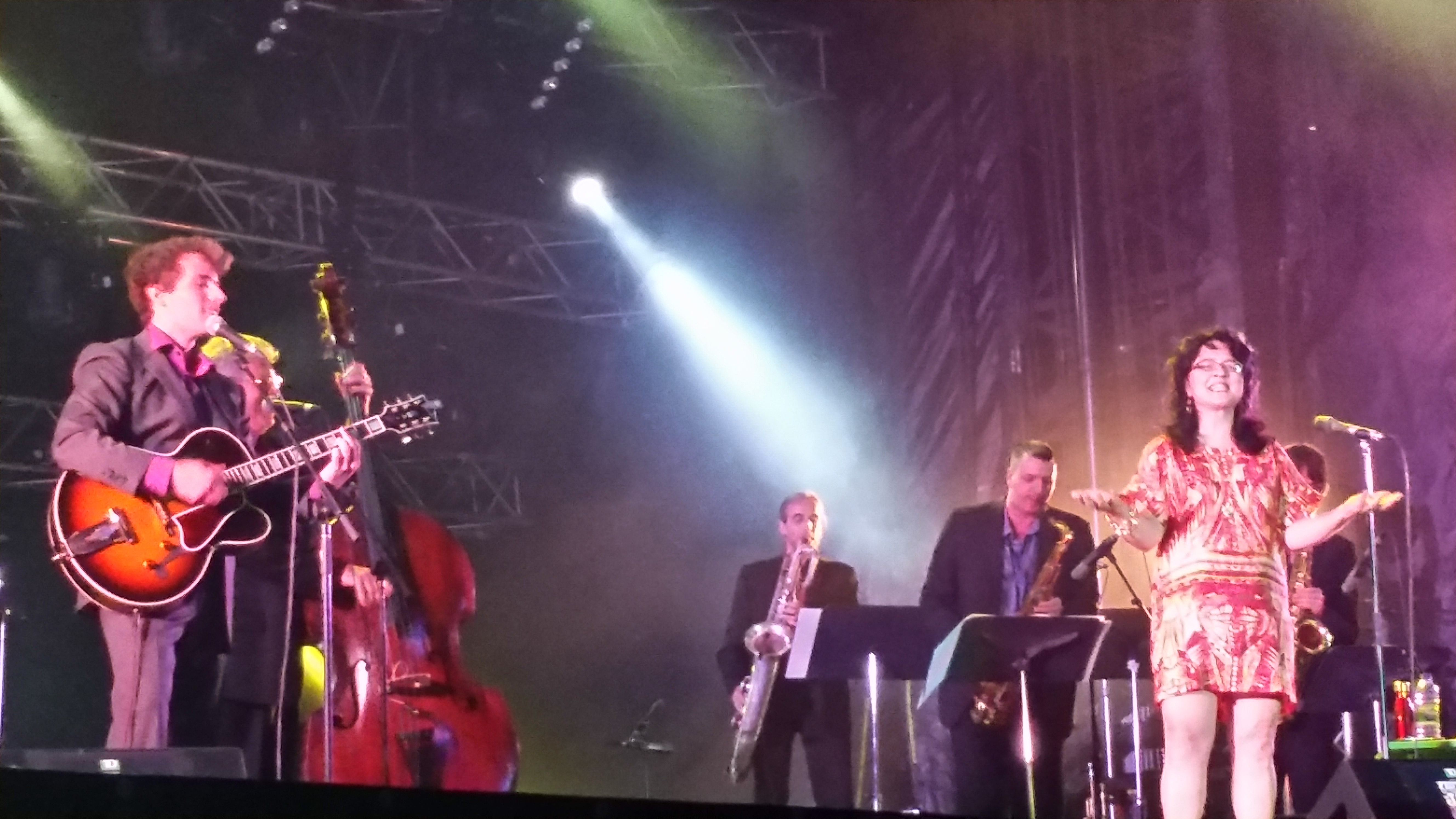 International Jazz Festival of Montreal 2014 – Quarter des Spectacles Montreal Festival International de Jazz de Montréal